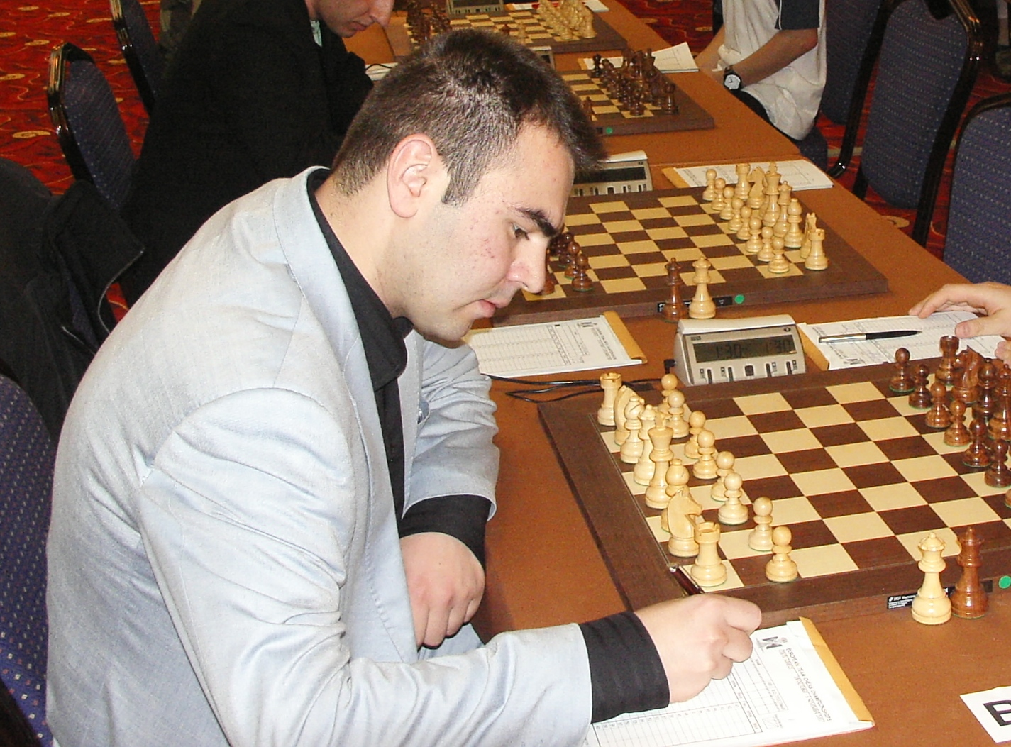 Azerbaijani Grandmaster Shakhriyar Mamedjarov during EuroChess 2007.